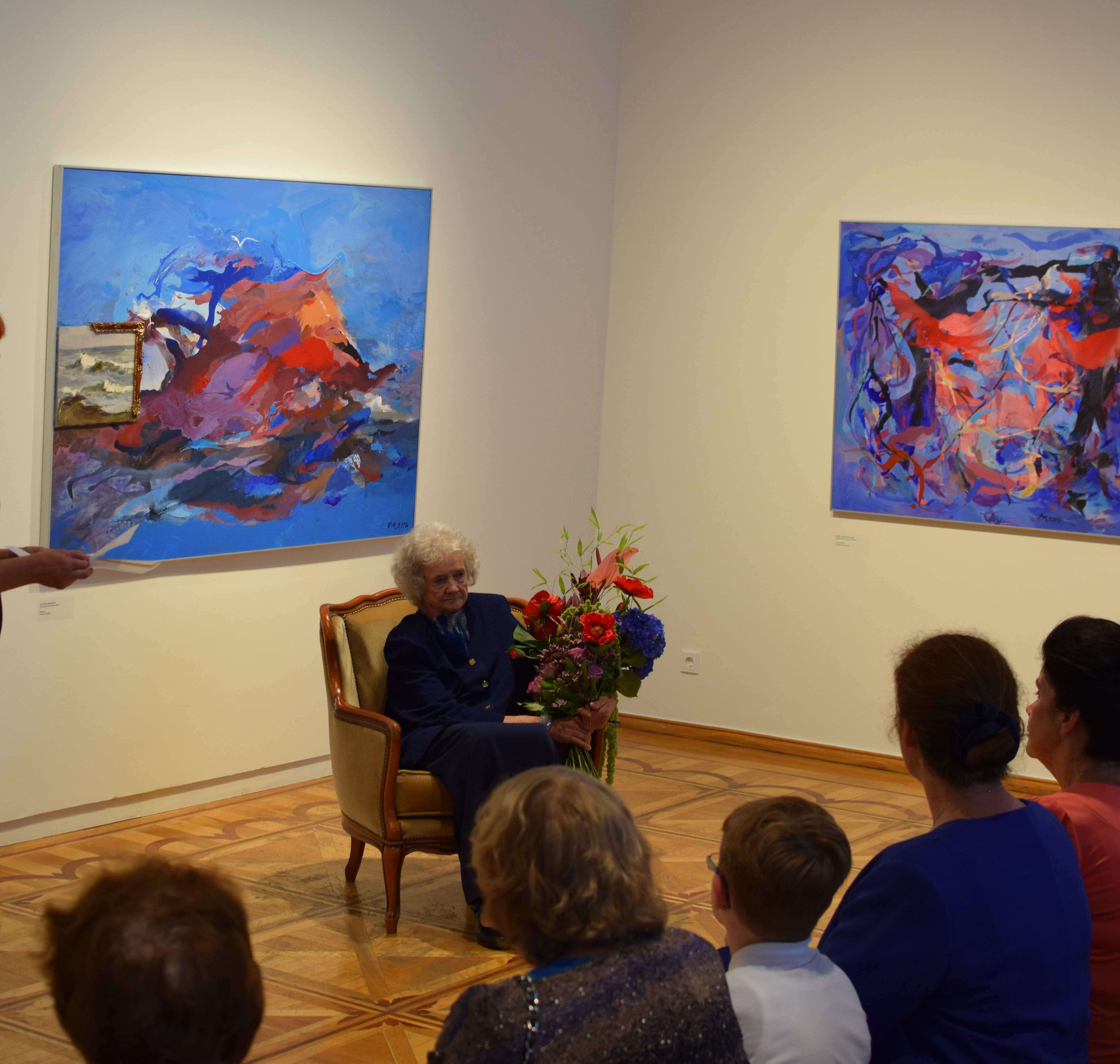 Lola Liivat oma näituse "Vaimu vastupanu" avamisel Tartu Kunstimuuseumis.